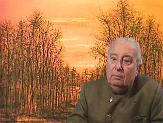 Portrait de Jean Carzou